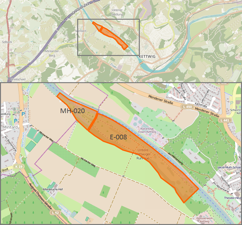 Naturschutzgebiet Untere Kettwiger Ruhraue (E-008, MH-020) – Karte